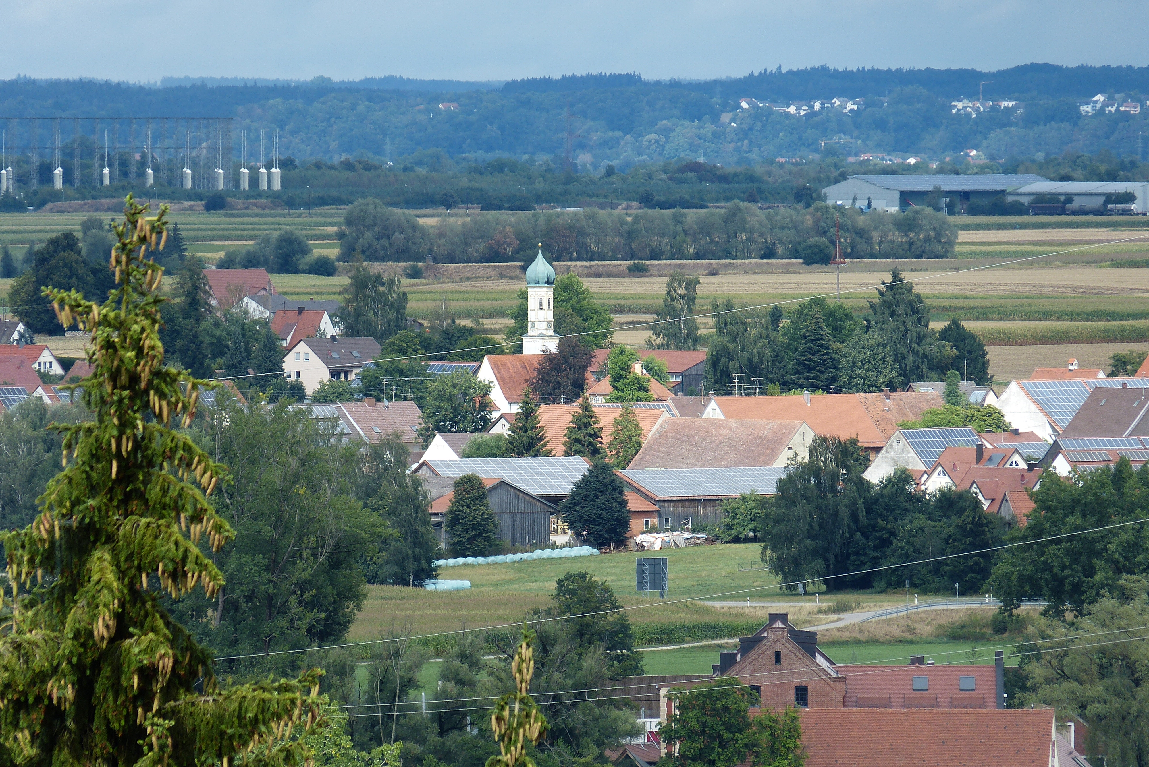 Hirblingen vom Hammelberg aus fotografiert